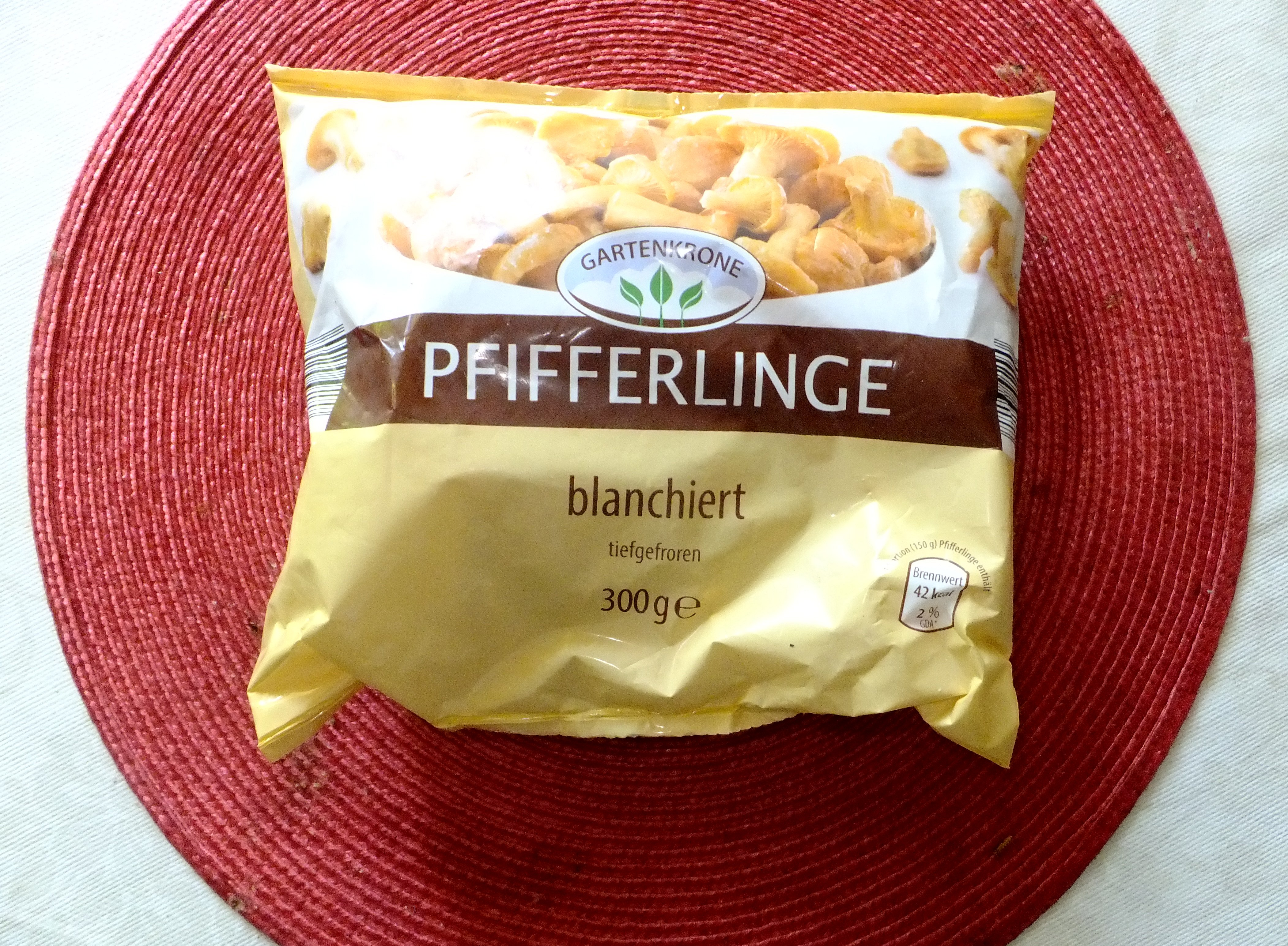 Pfifferlinge 4, TK und blanchiert